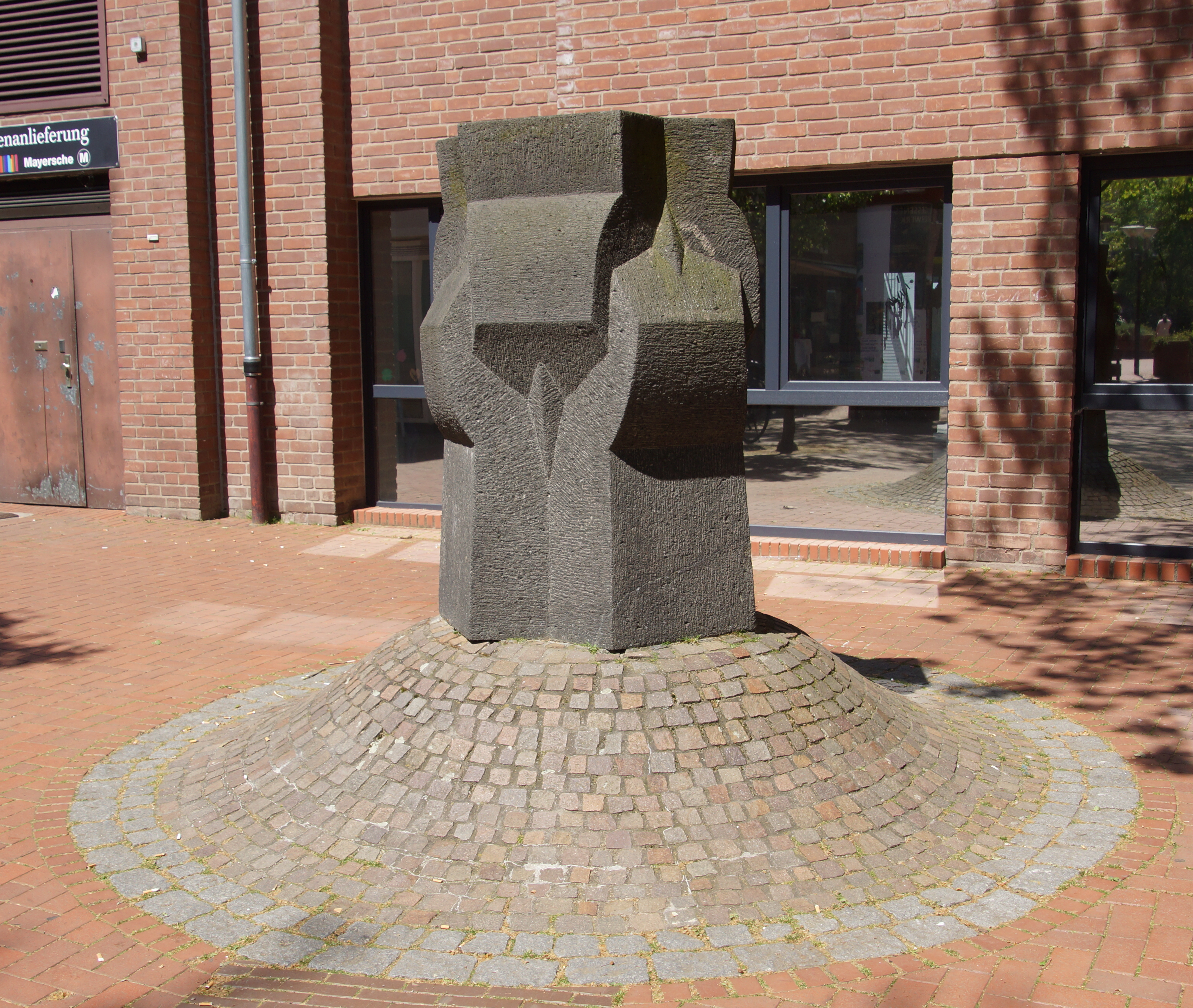 Skulptur Gordischer Knoten in der Frechenener Fußgängerzone, 1990 von Attila Kirilowitsch aus Eifeler Basalt erstellt